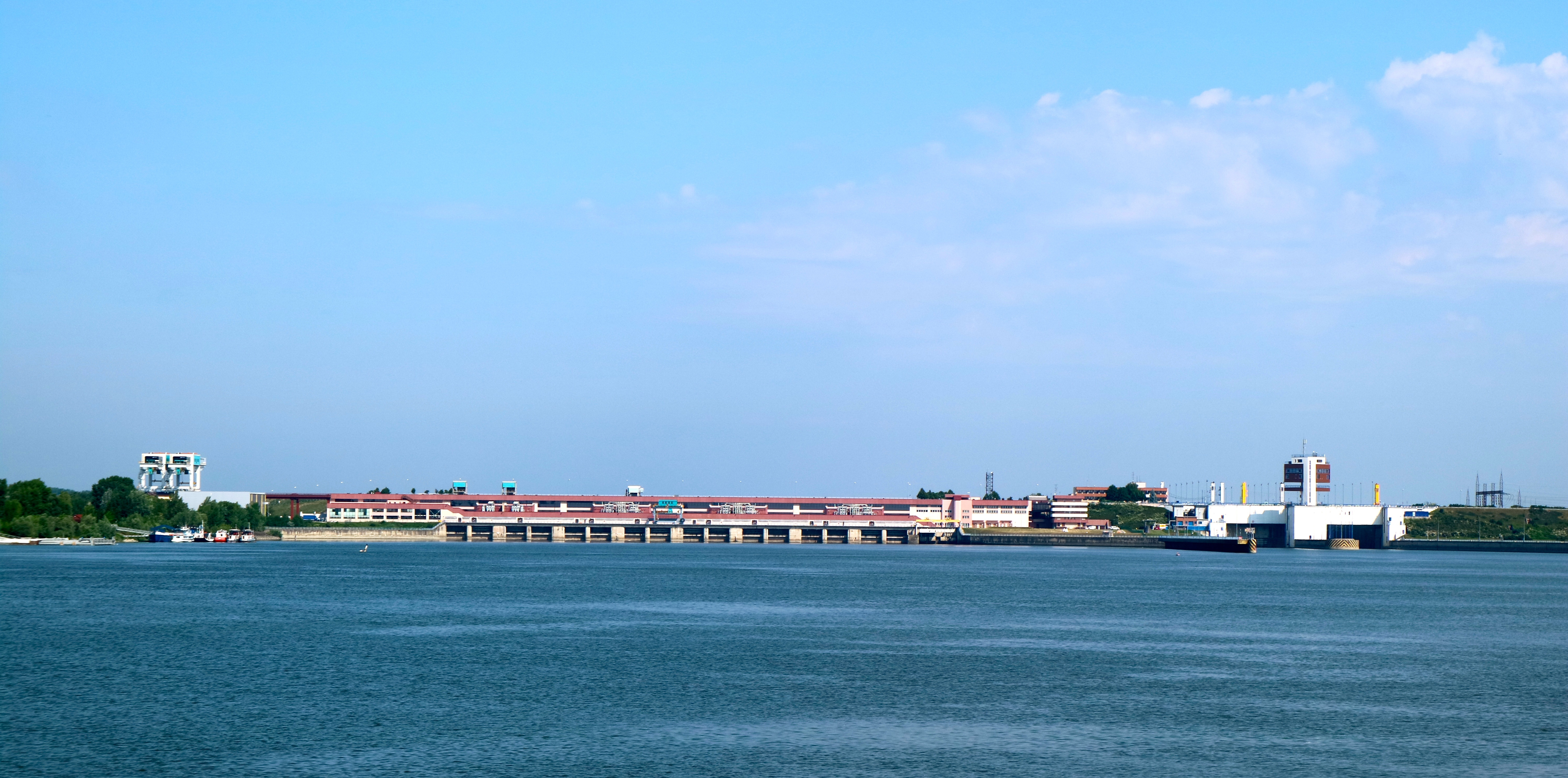 Gabcikovo Dam